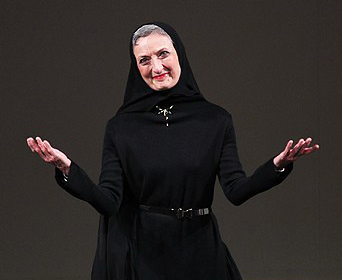 فریماه قوام صدری - اختتامیه بیست و نهمین جشنواره بین المللی موسیقی فجر تالار وحدت تهران اول اسفند ۱۳۹۲